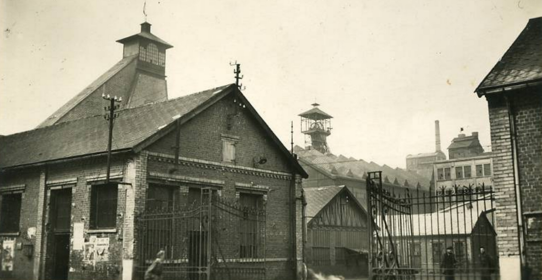 La fosse n° 21 - 22 dite Hector Coppin de la Compagnie des mines de Courrières était un charbonnage constitué de deux puits situé à Harnes, Pas-de-Calais, Nord-Pas-de-Calais, France.